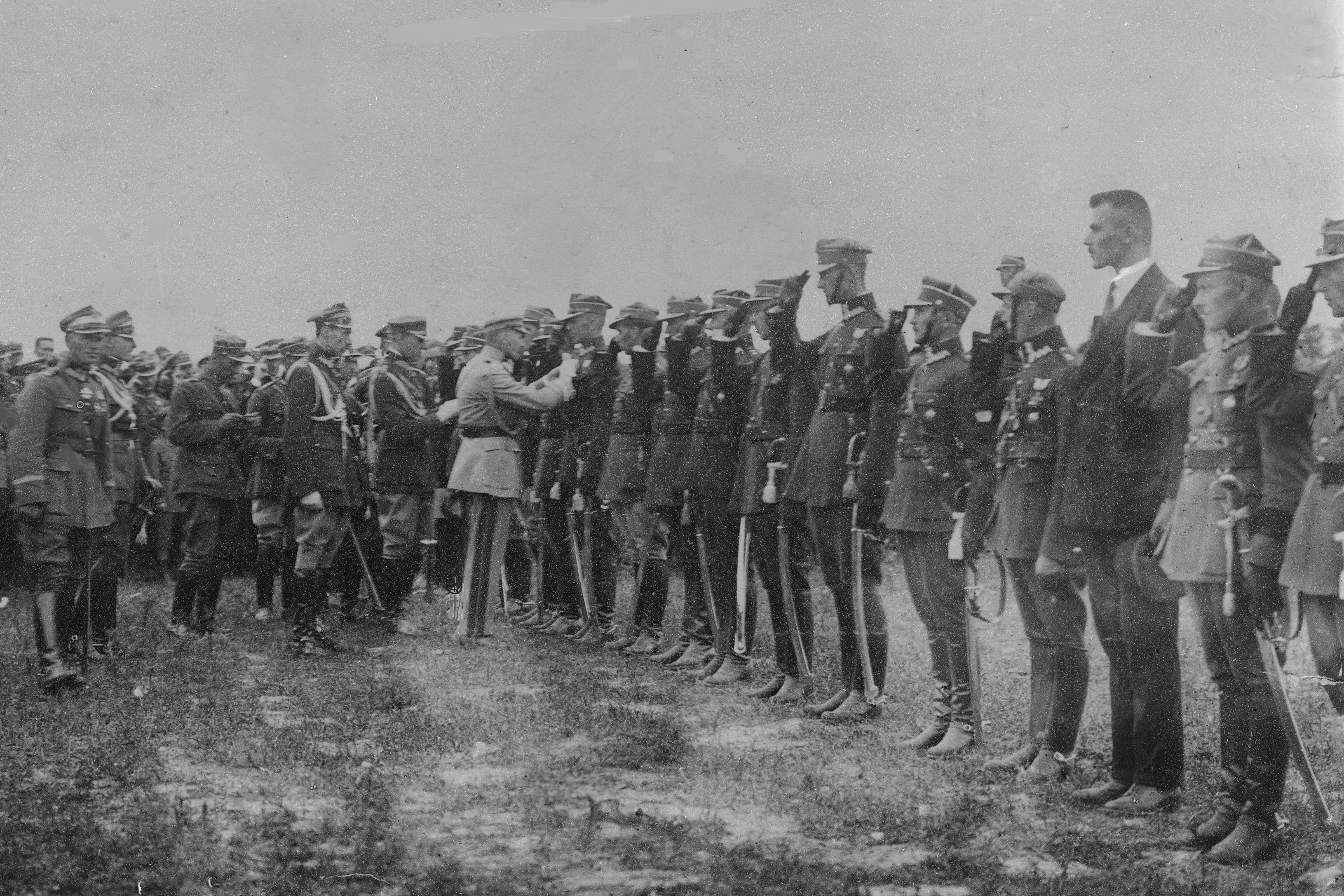 Marszałek Józef Piłsudski odznacza oficerów 30 Dywizji Piechoty. Widoczni m.in.: gen. Edward Śmigły-Rydz (z lewej strony, twarzą do fotografa) i adiutant Naczelnego Wodza ppłk Bogusław Miedziński (2. na lewo od Piłsudskiego).